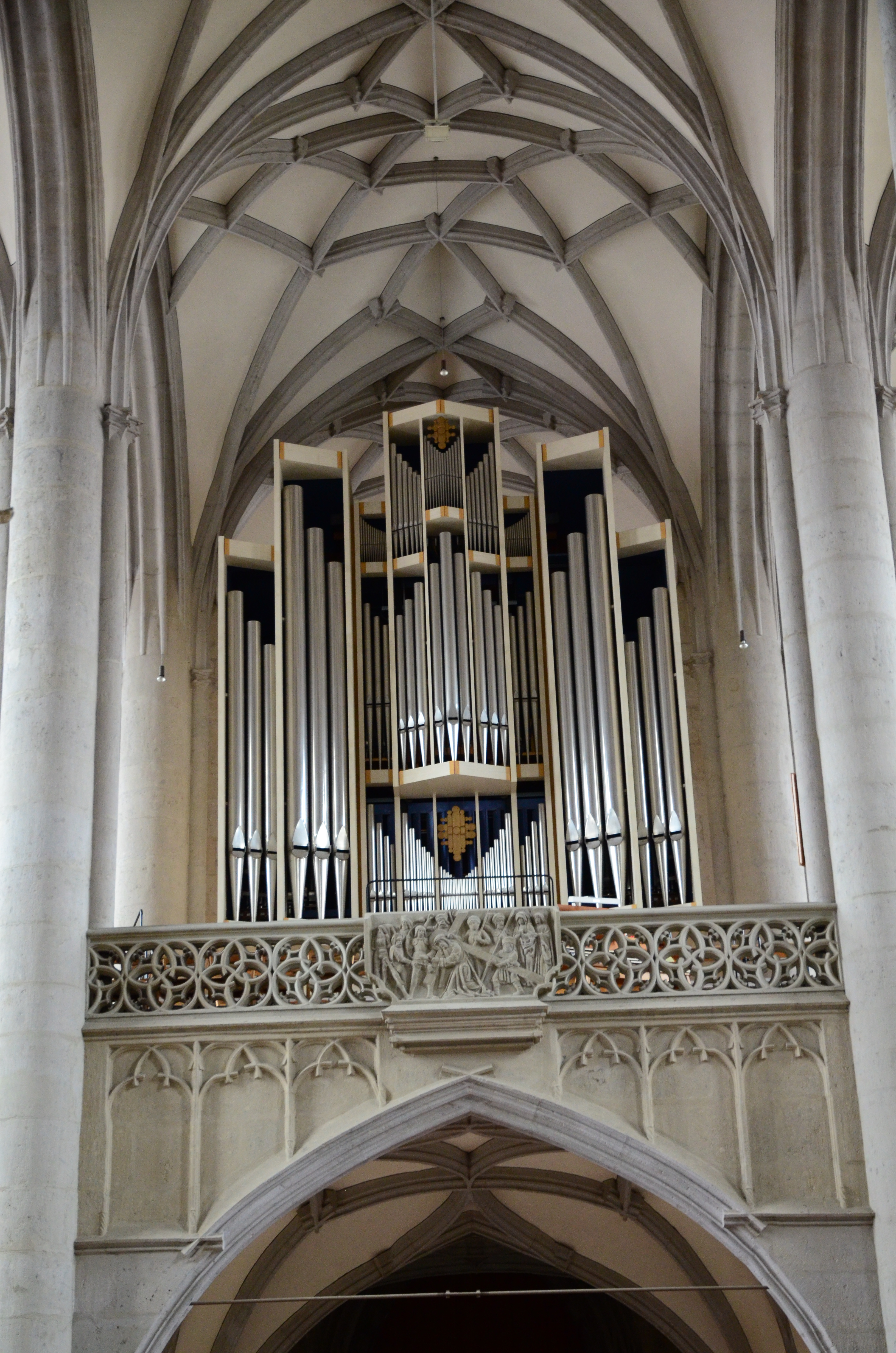 Nördlingen, St. Georg, Hauptorgel